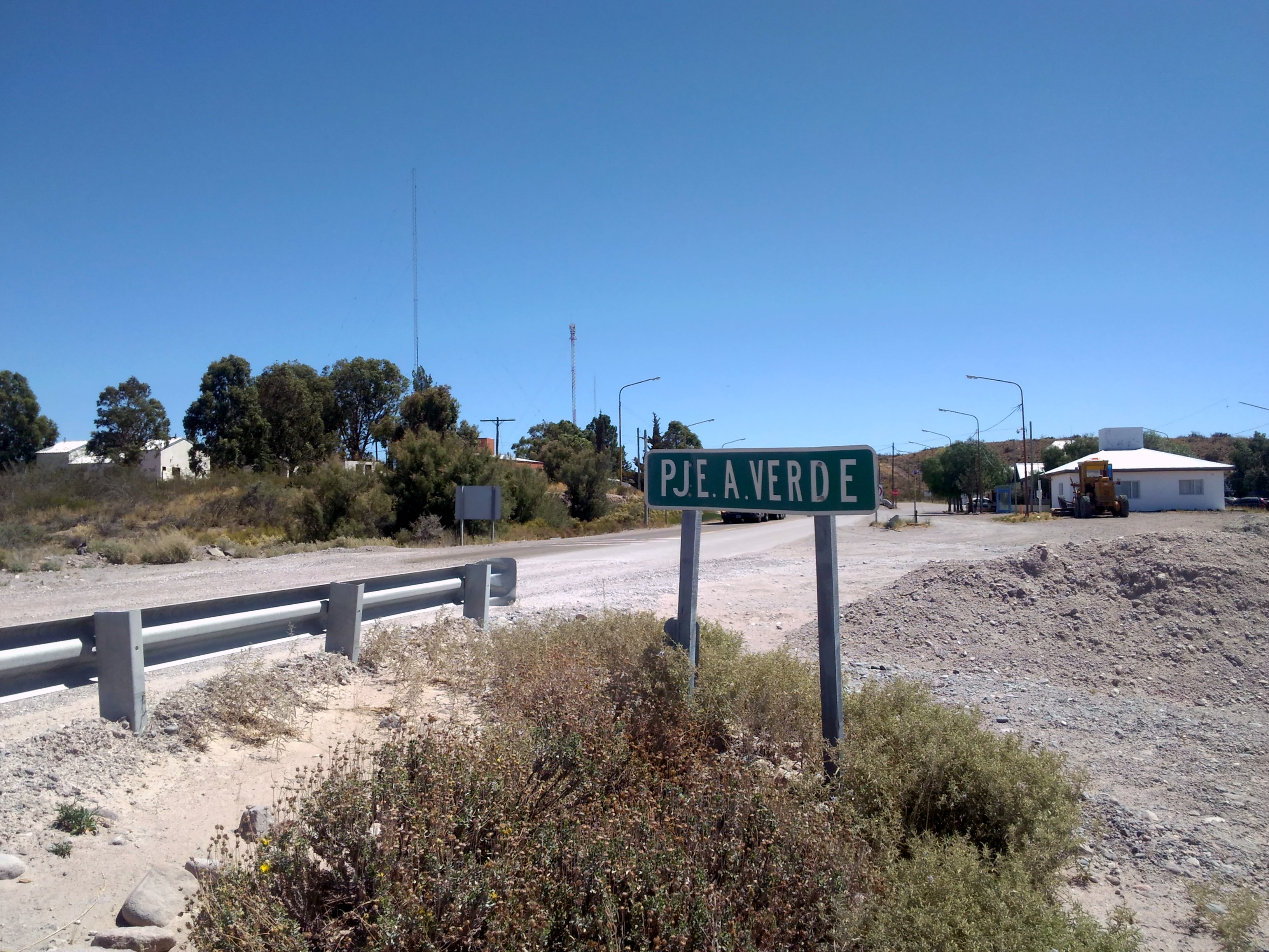 Ingreso a la localidad